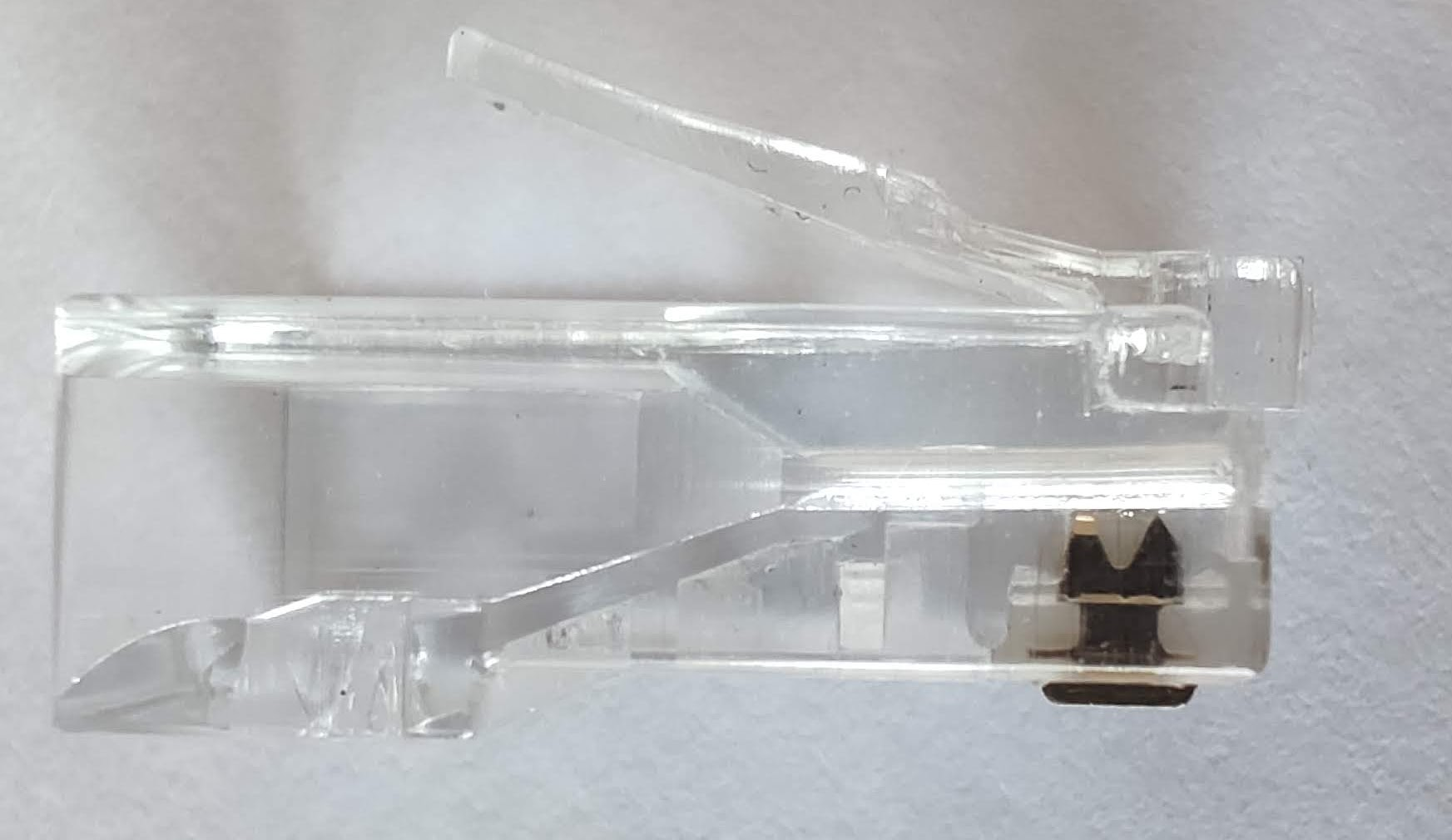 Konektor 8P8C (RJ-45) má pro flexibilní vodič typu lanko nože ve tvaru písmene U, kde se hroty zaříznou přímo do lanka. Pokud by se tento konektor použil pro pevný vodič typu drát, došlo by k jeho nalomení a časem k narušení vodivého spojení.